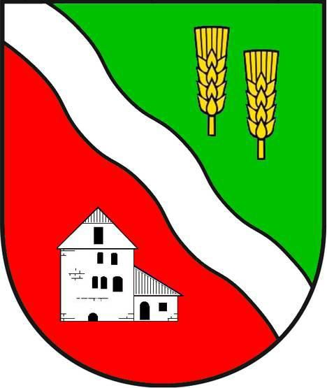 Wappen von Brüheim